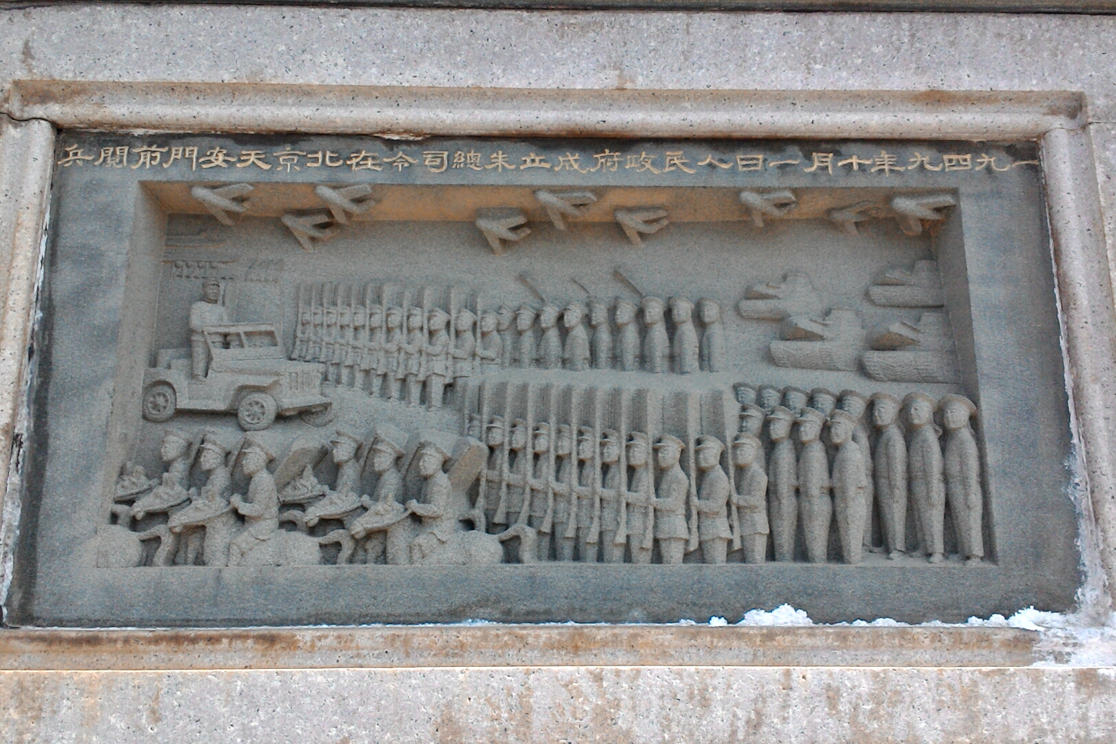 一九四九年十月一日人民政府成立朱總司令在北京天安門前閱兵,福建省廈門市集美區集美街道潯江社區